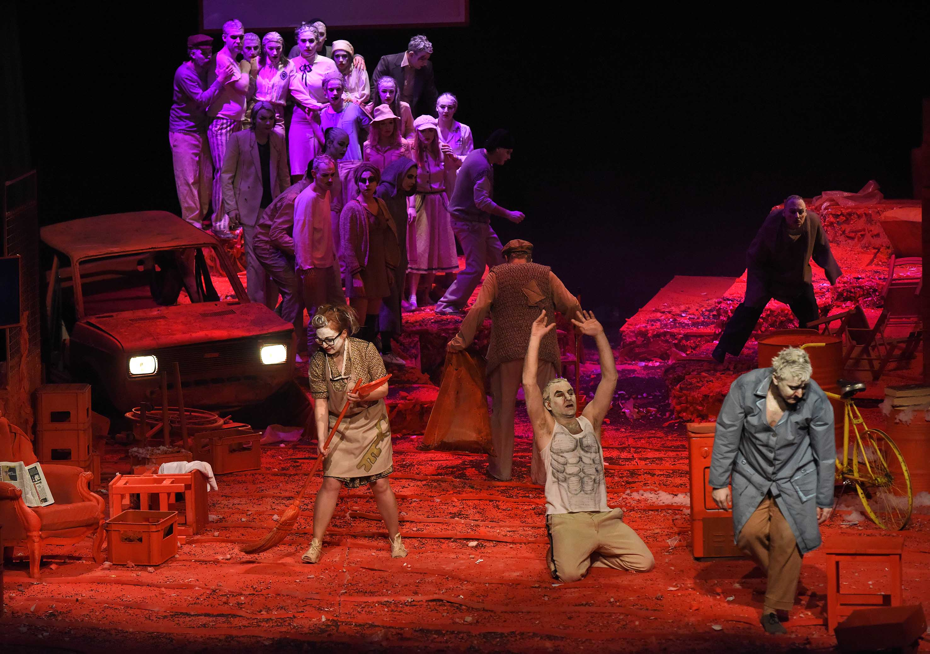 Fotografija iz predstave DVESTA